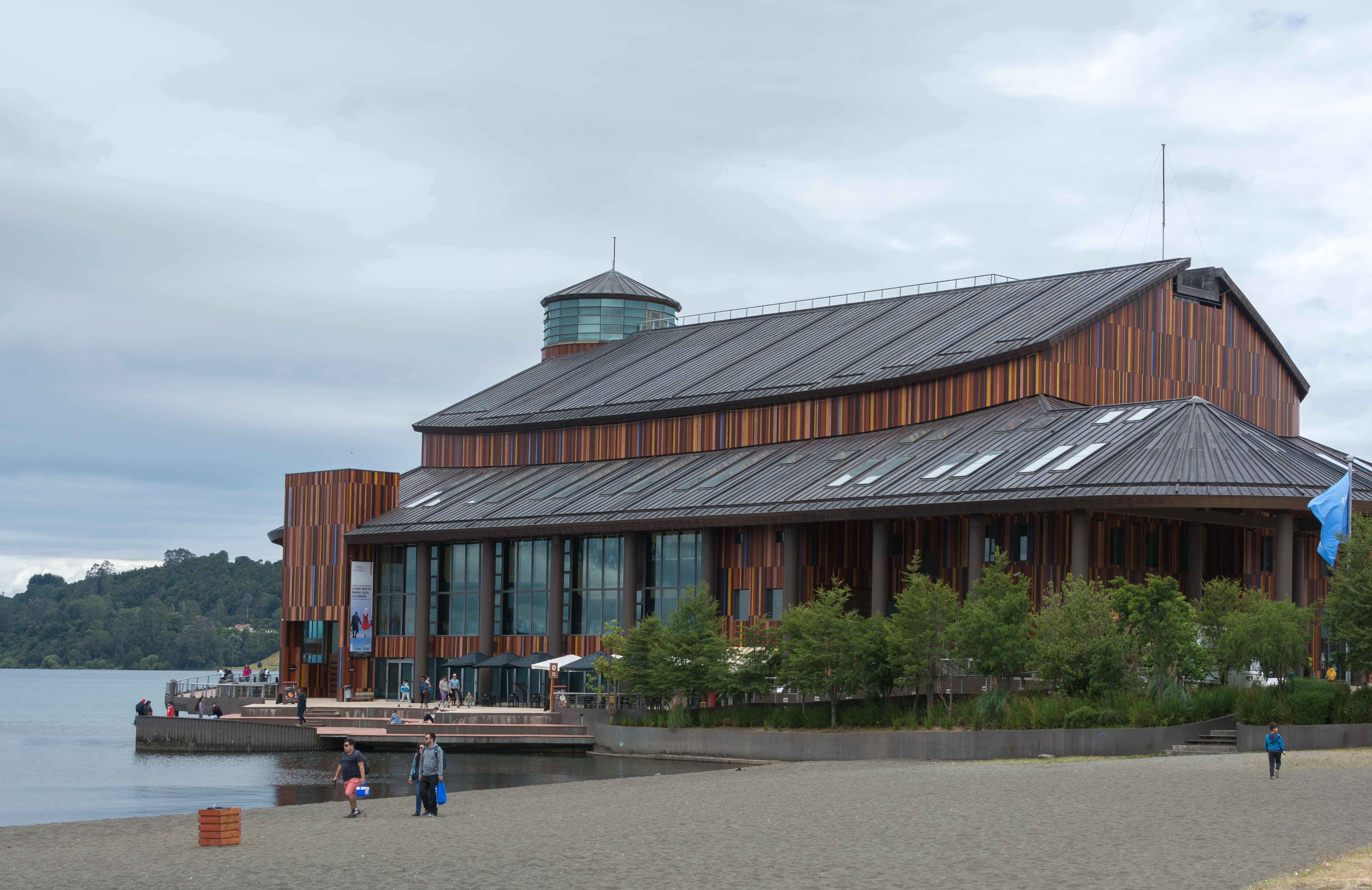 Teatro del Lago, Frutillar, Región de Los Lagos, Chile.